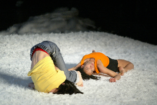 Die 2004 von Saskia Höbling entworfene Choreografie superposition corps